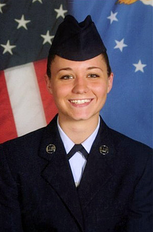 Airman Basic Paige Renee Villers